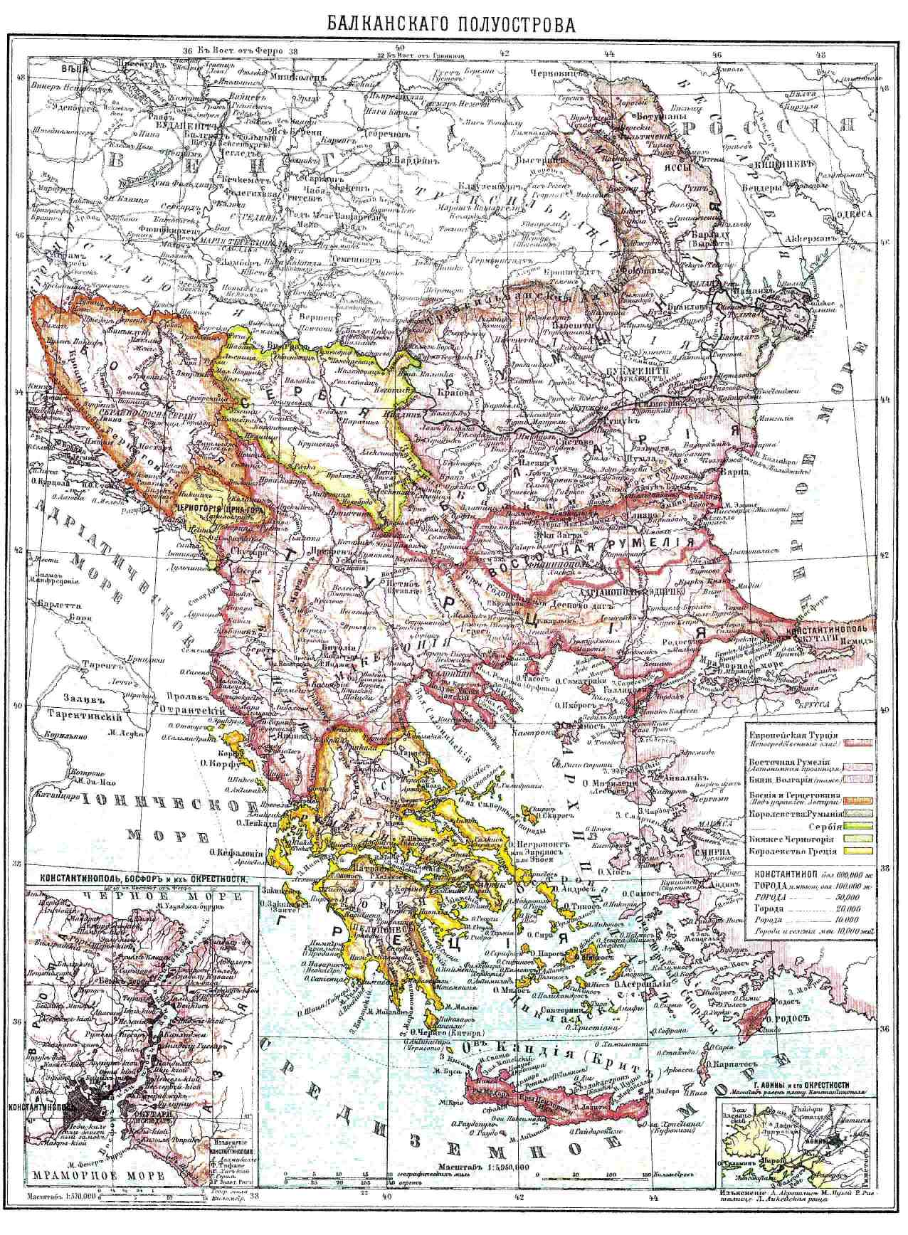 Карта Балканского полуострова